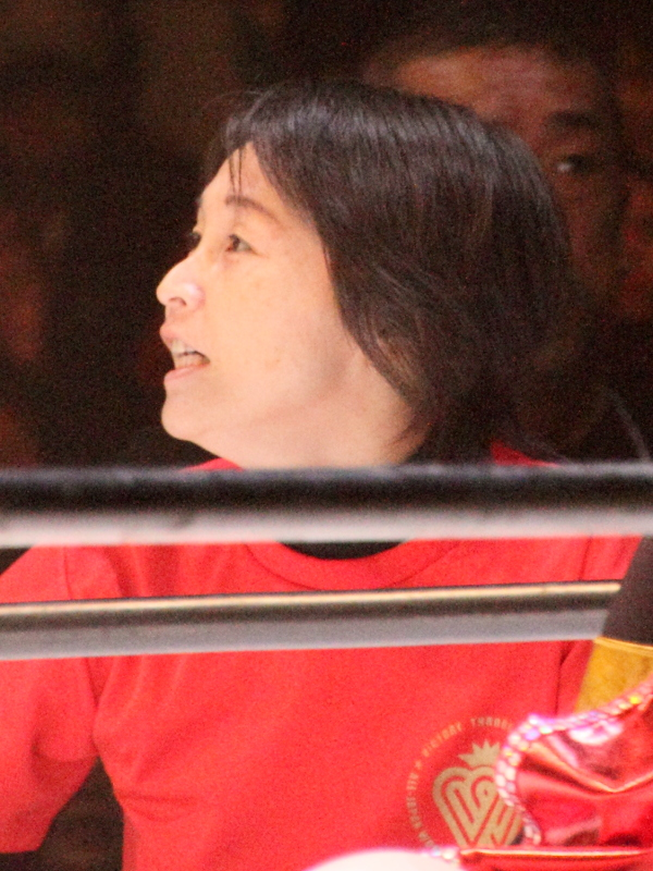 2014年3月22日 大田区総合体育館